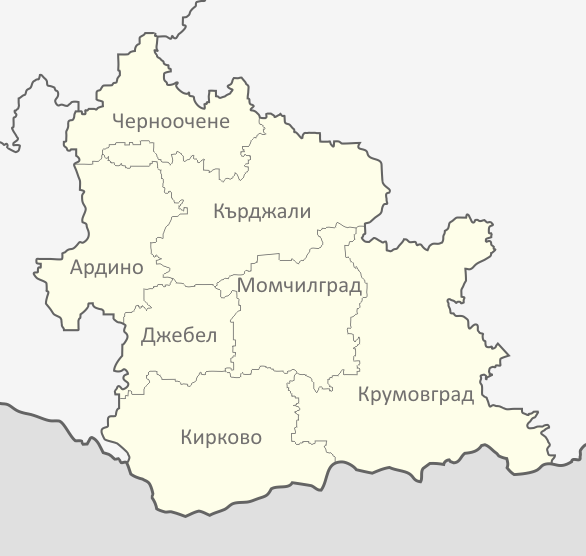 Картата е създадена от Любомир Таушанов